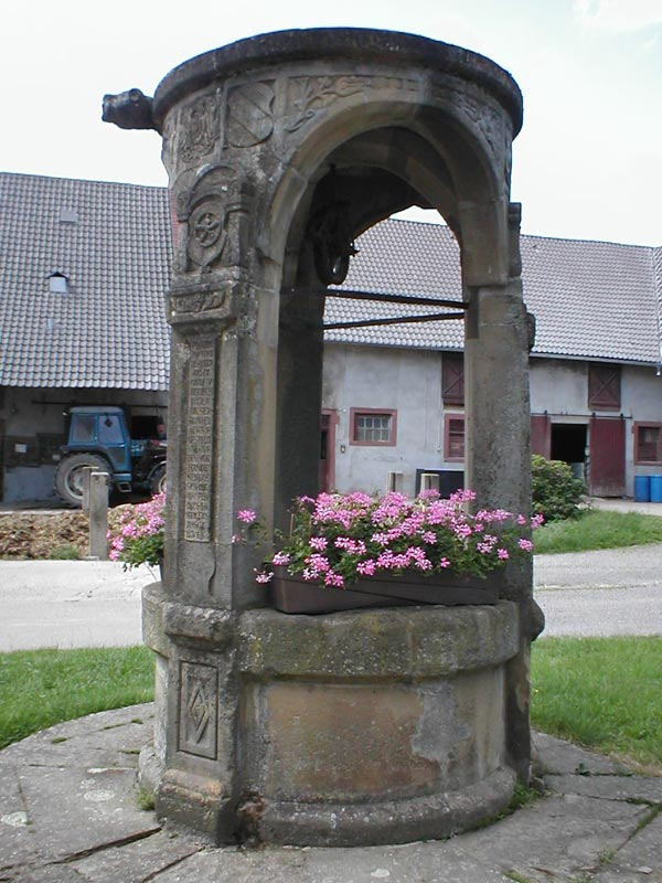 Renaissancezeitlicher Ziehbrunnen im Alten Schloss in Helmstadt.